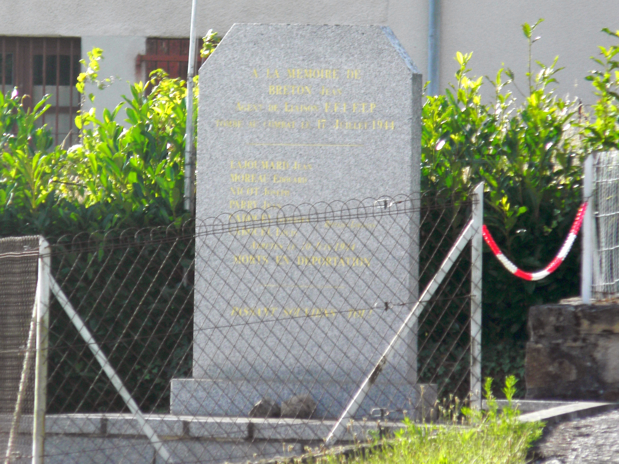 Stèle en mémoires aux déportés du 10 juin 1944